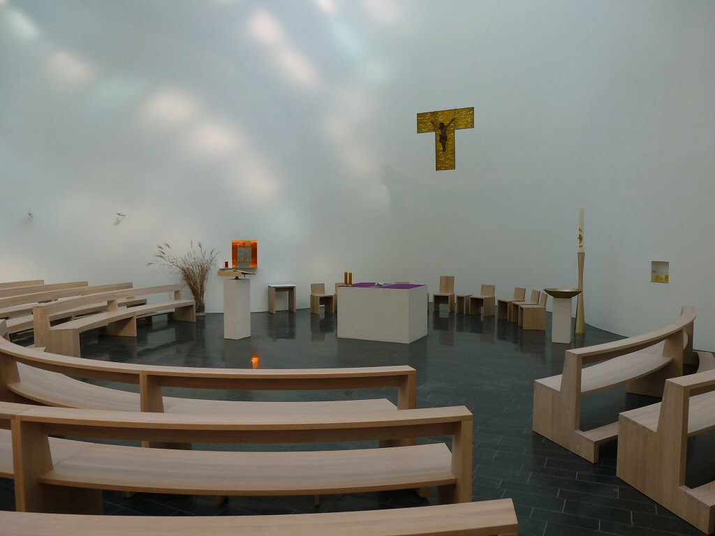 Innenansicht der katholischen Kirche St. Marien in Schillig, Gemeinde Wangerland, Niedersachsen